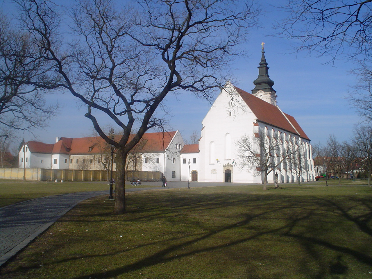 Szeged Alsóvárosi ferences kolostor